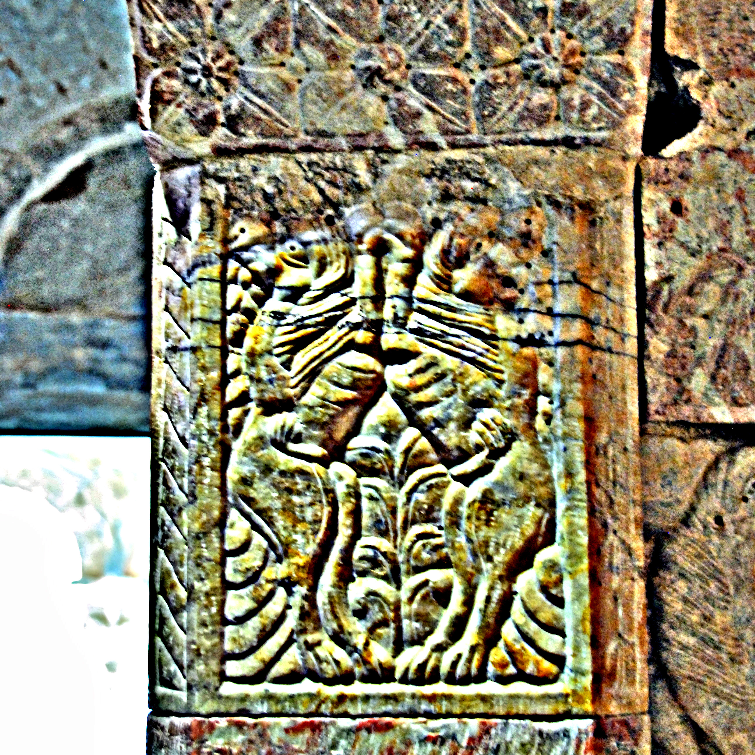 Serrabone, Empore, Laibung Ostwande, Relief Nr.17